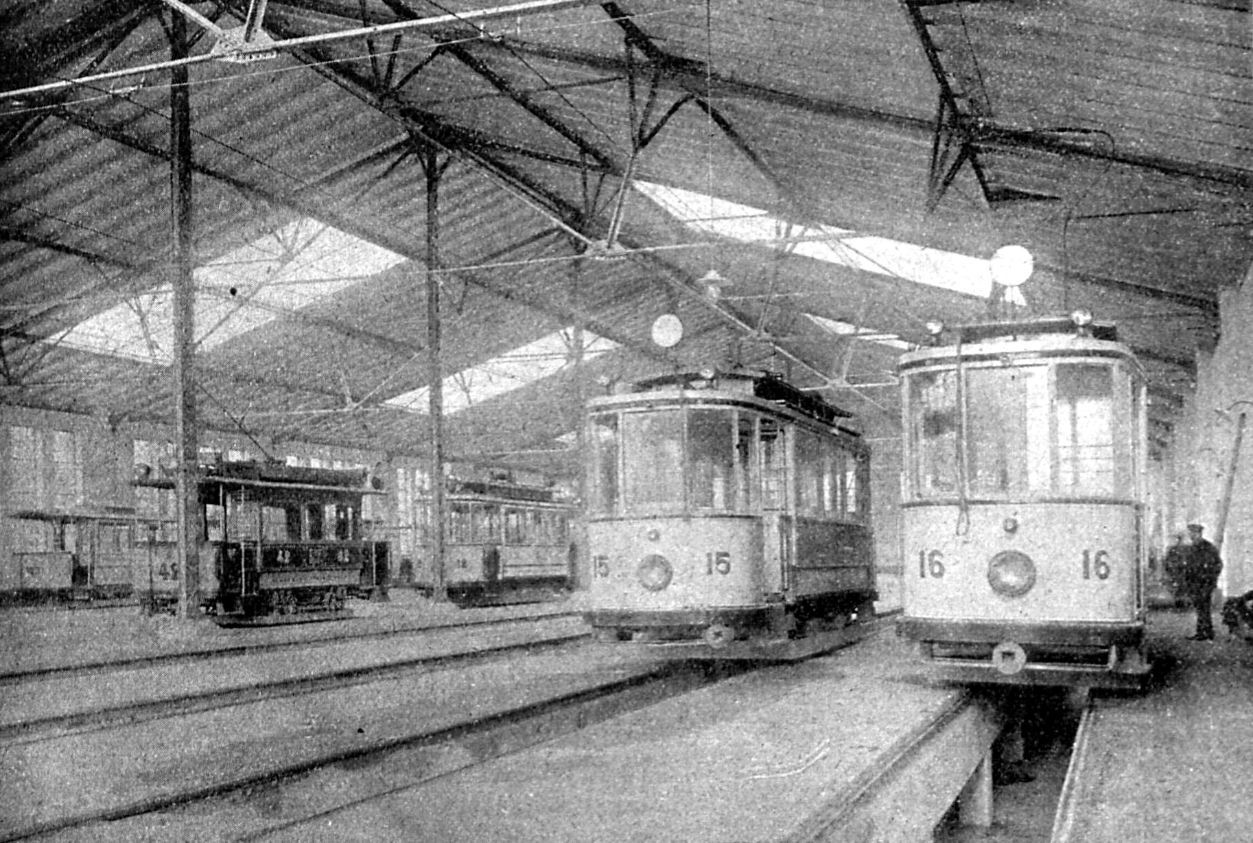 Innenansicht der zusätzlichen Wagenhalle in der Finkenstraße in der Breite